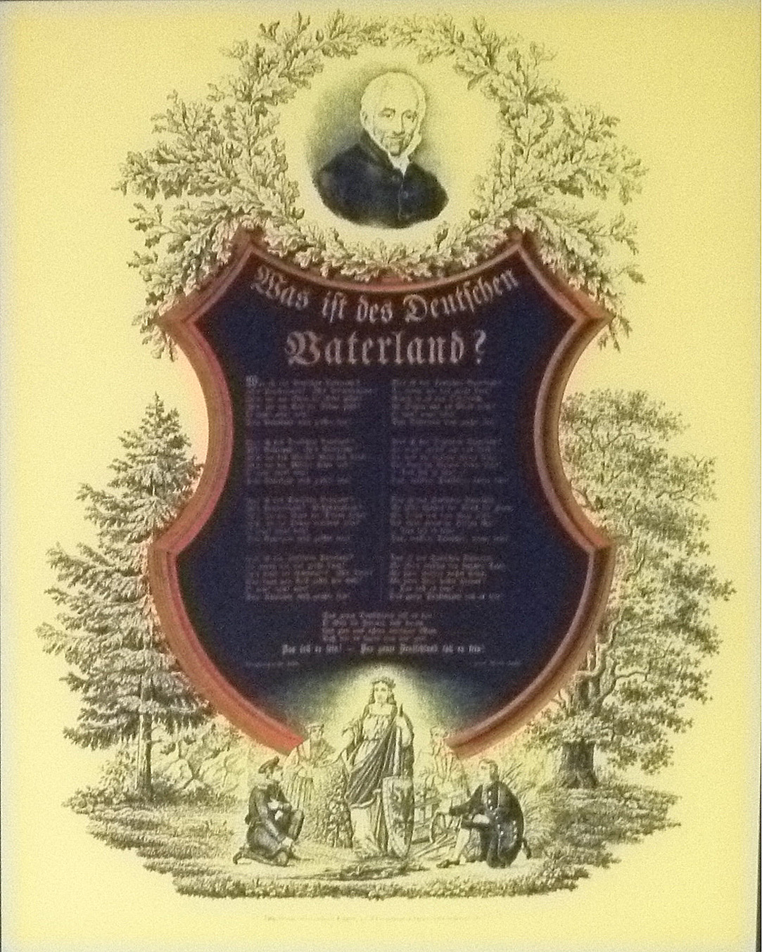 Des Deutschen Vaterland ist ein 1813 von Ernst Moritz Arndt (1769–1860) noch vor der Völkerschlacht bei Leipzig verfasstes Lied.